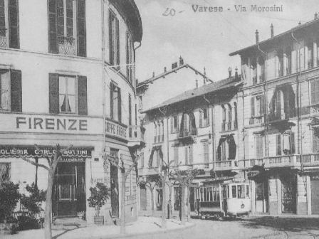 Varese, via Morosini